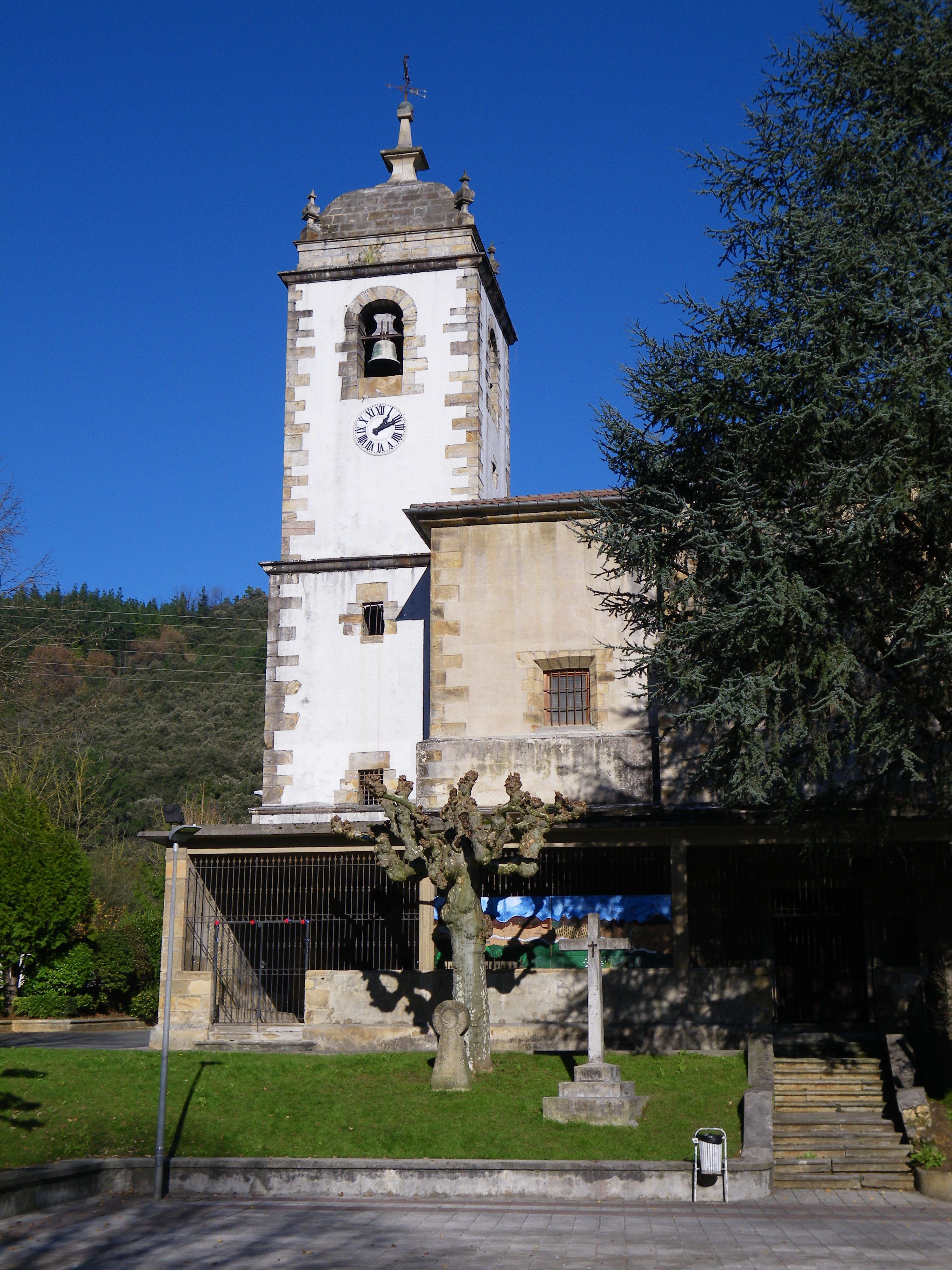 Andra Mari eleiza, Lemoa, Bizkaia, Euskal Herria.